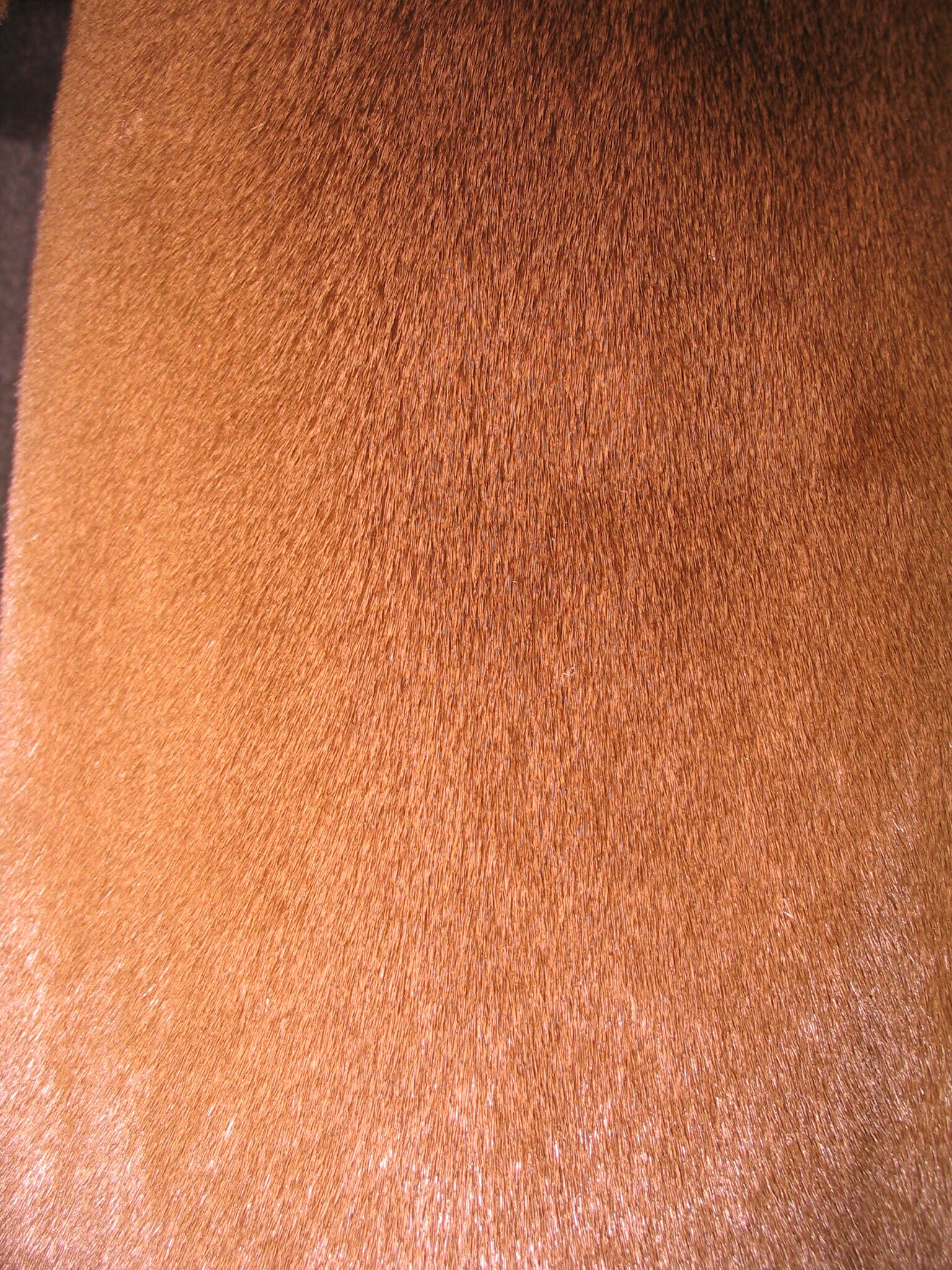 Arianha-Otter (südamerikanischer Riesenotter, Pteronura brasiliensis, (Gmelin)) - geschützte Art)), ca. 30 Jahre altes Fell (aus ca. 1967)